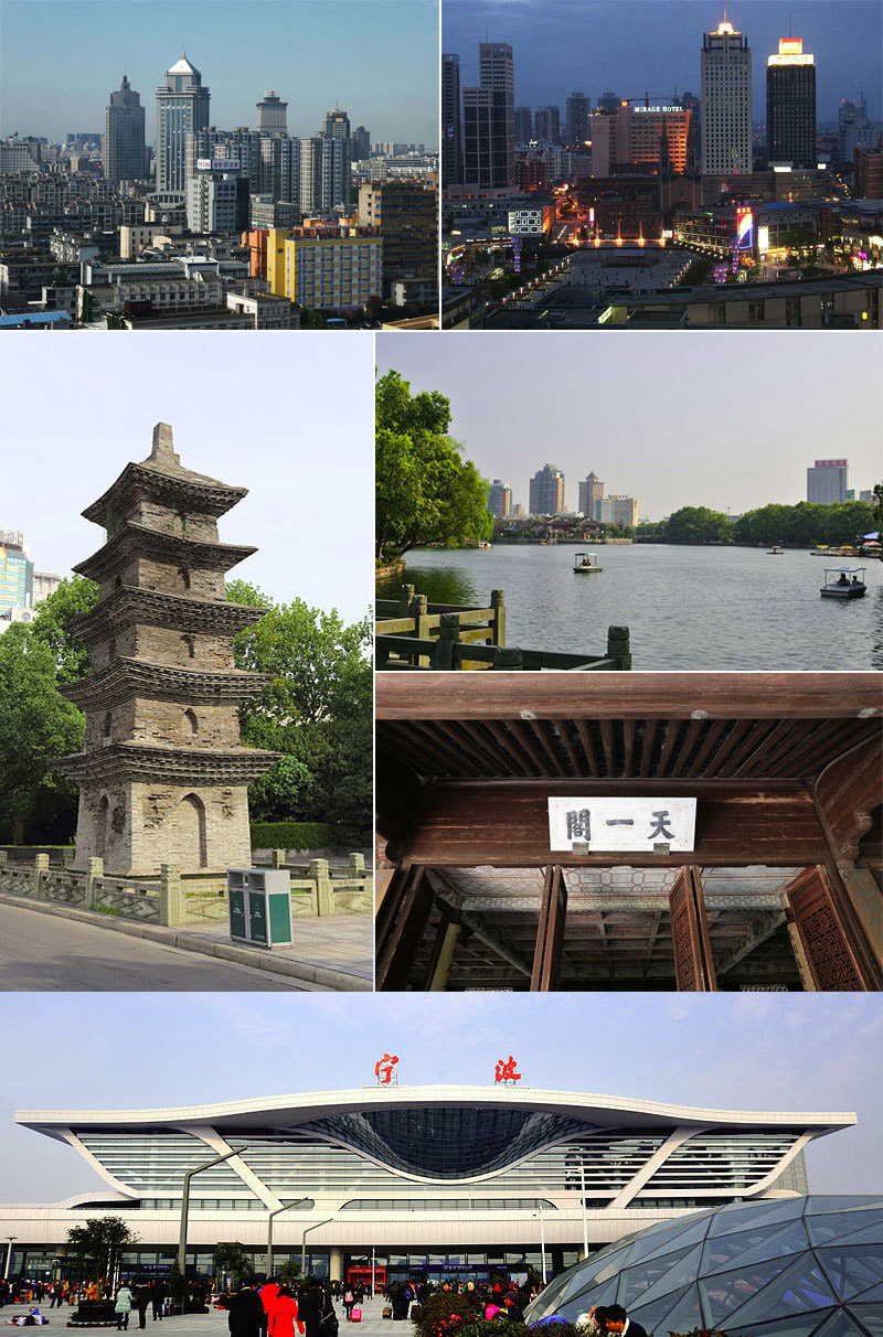 宁波市海曙区拼图